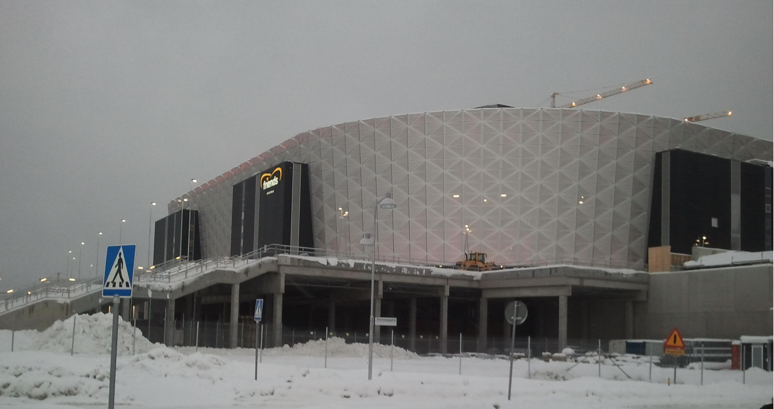 Friends Arena din Stockholm